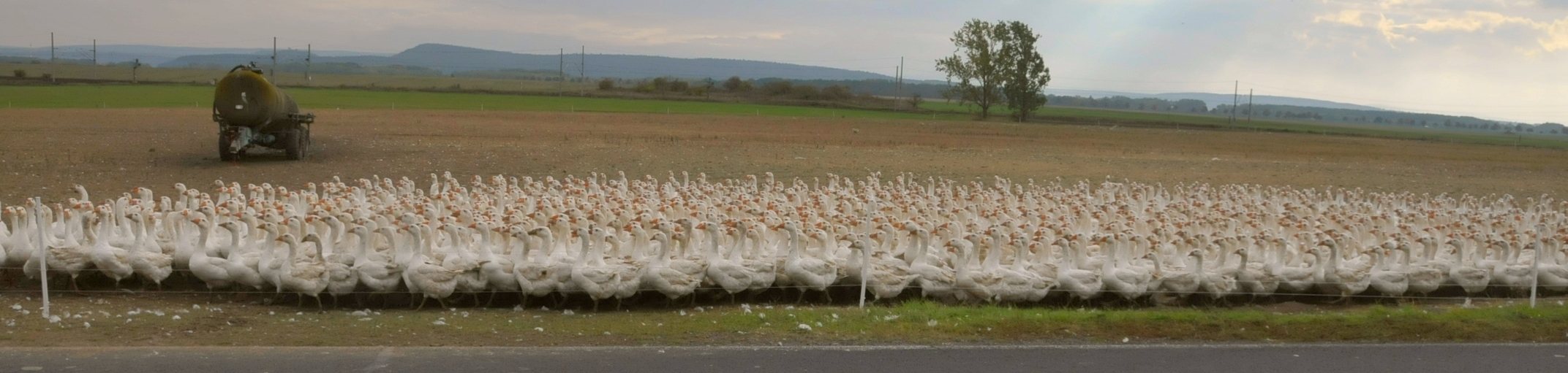 Gänse im Gänsemarsch in Cobstädt (Thüringen)